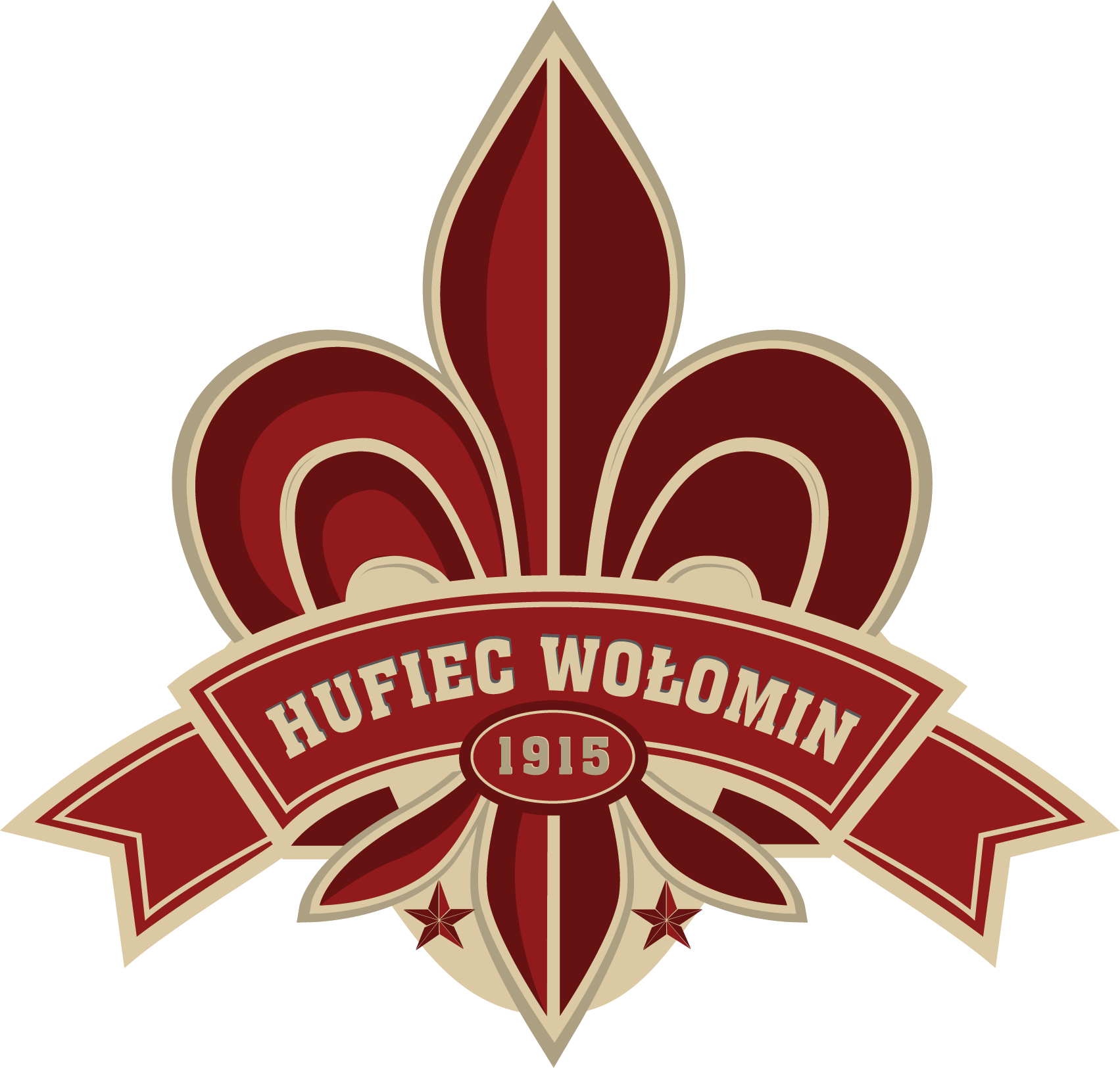 Herb, plakietka Hufca ZHP Wołomin